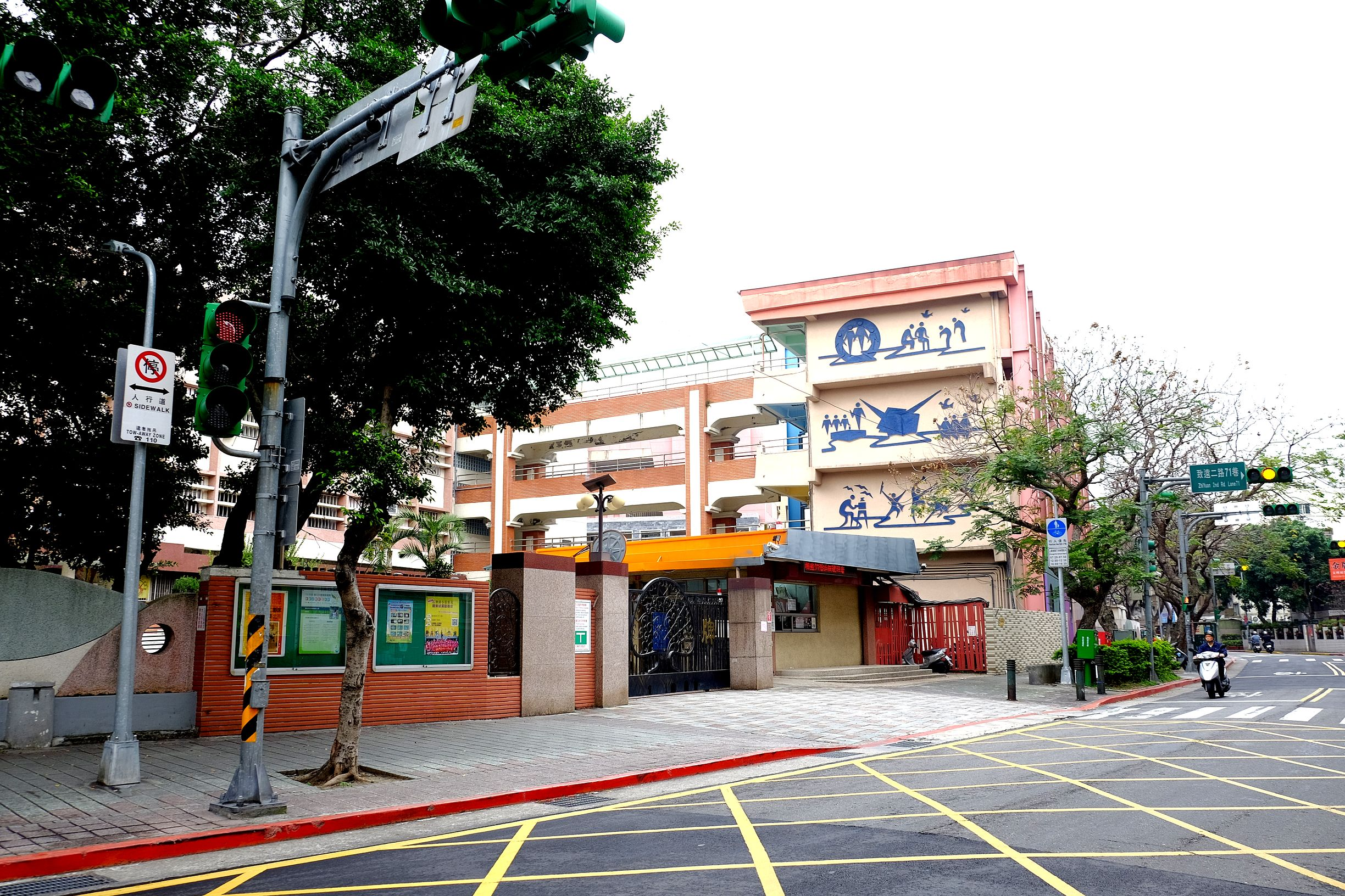 臺北市立石牌國民小學